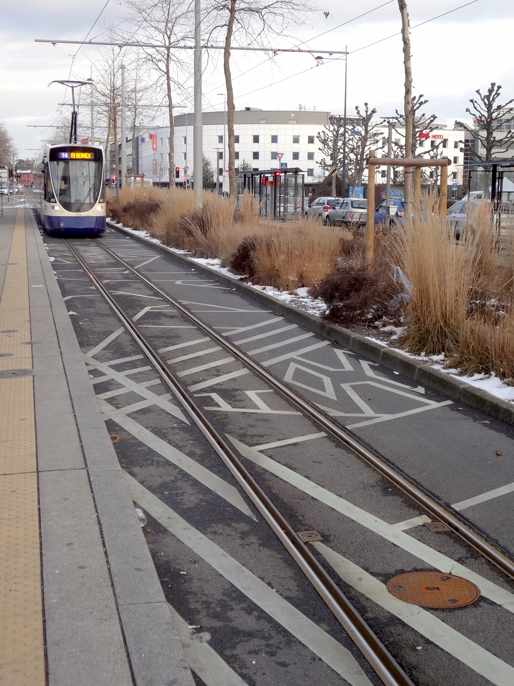 Art contemporain. Trame et tram de Silvie Defraoui (2013). Arrêt Les Esserts à Lancy.